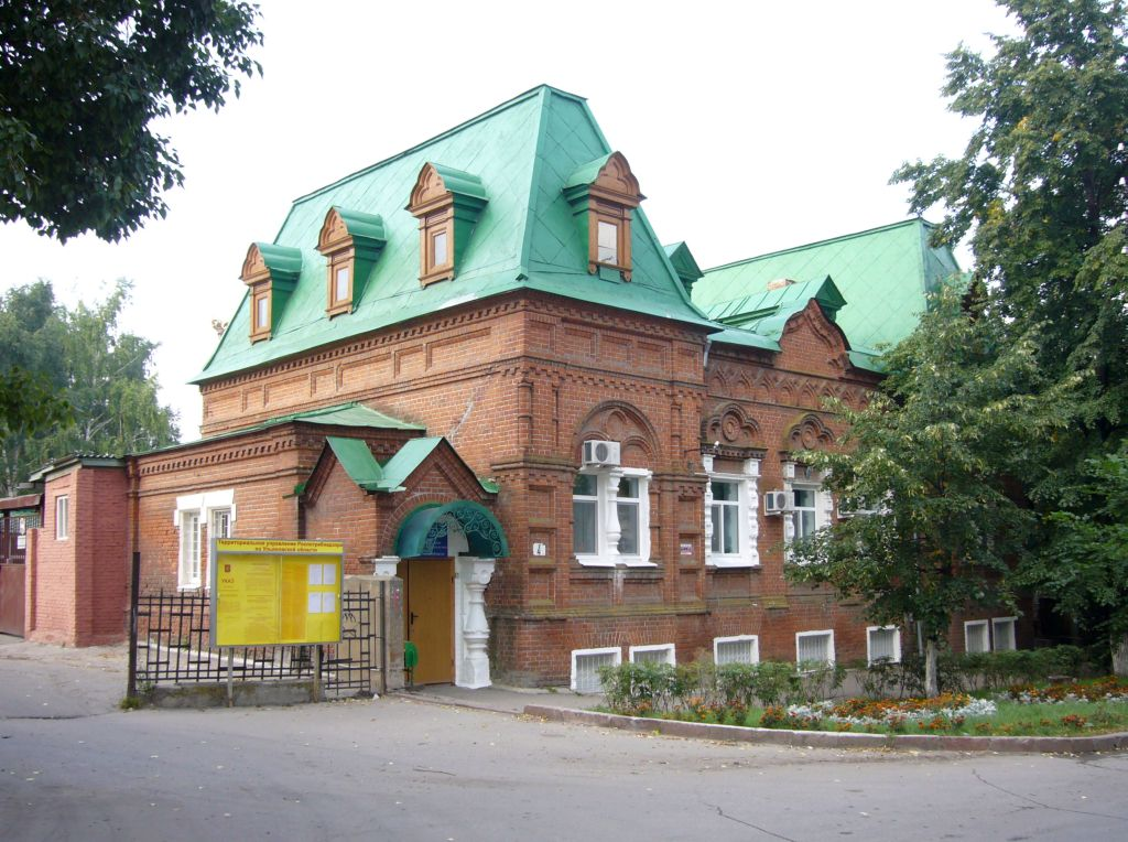 Симбирск. Ветеринарная лечебница. Архитектор А.А. Шодэ. 1910 г.